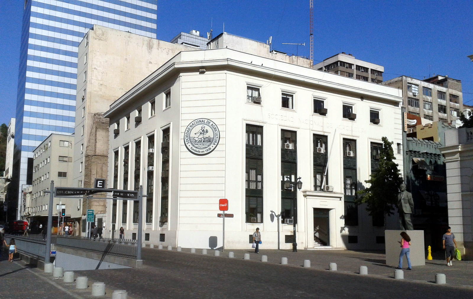 Edificio de la Sociedad Nacional de Agricultura, calle Agustinas con Tenderini, Santiago de Chile.